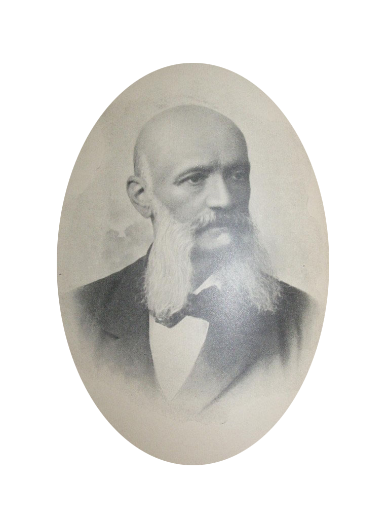 Anatomopatologo